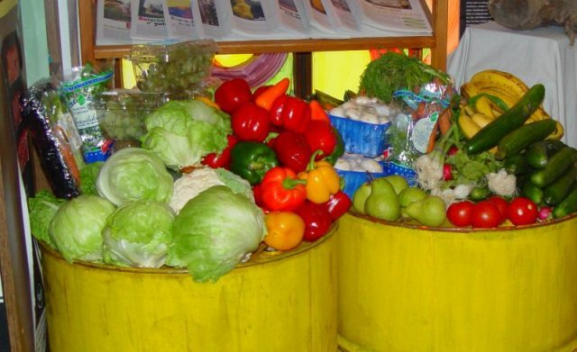 Inbraak containerpark te Sint-Truiden